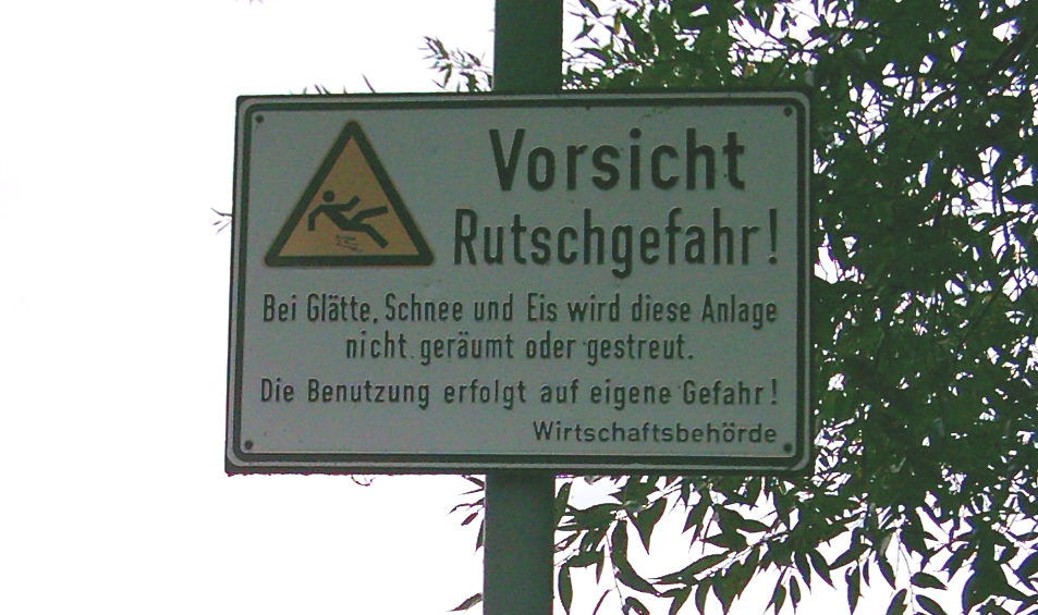 Schild Vorsicht Rutschgefahr, Hamburg.